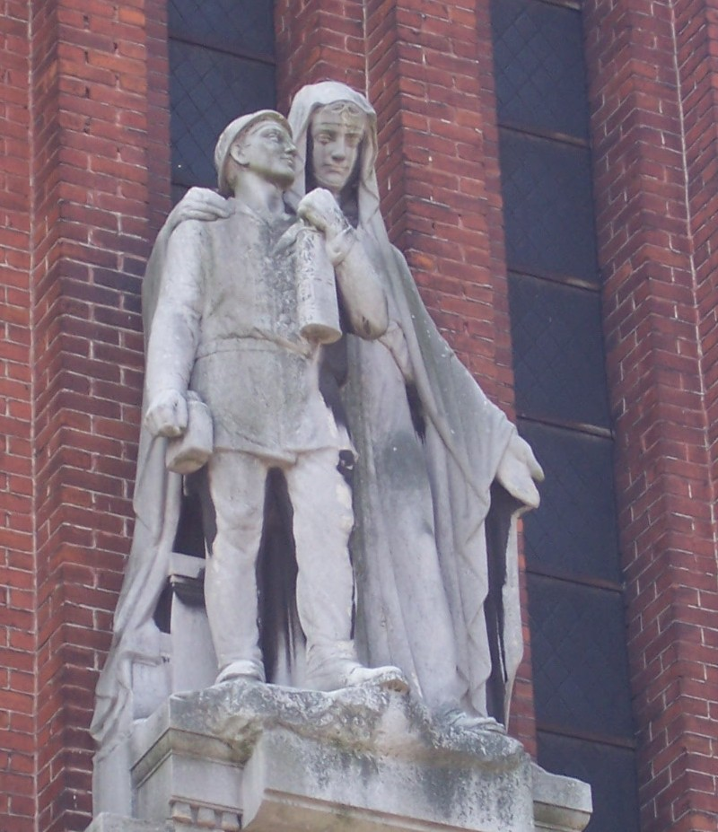 Statue de sainte Barbe, sur l'église qui lui est dédiée à Anzin